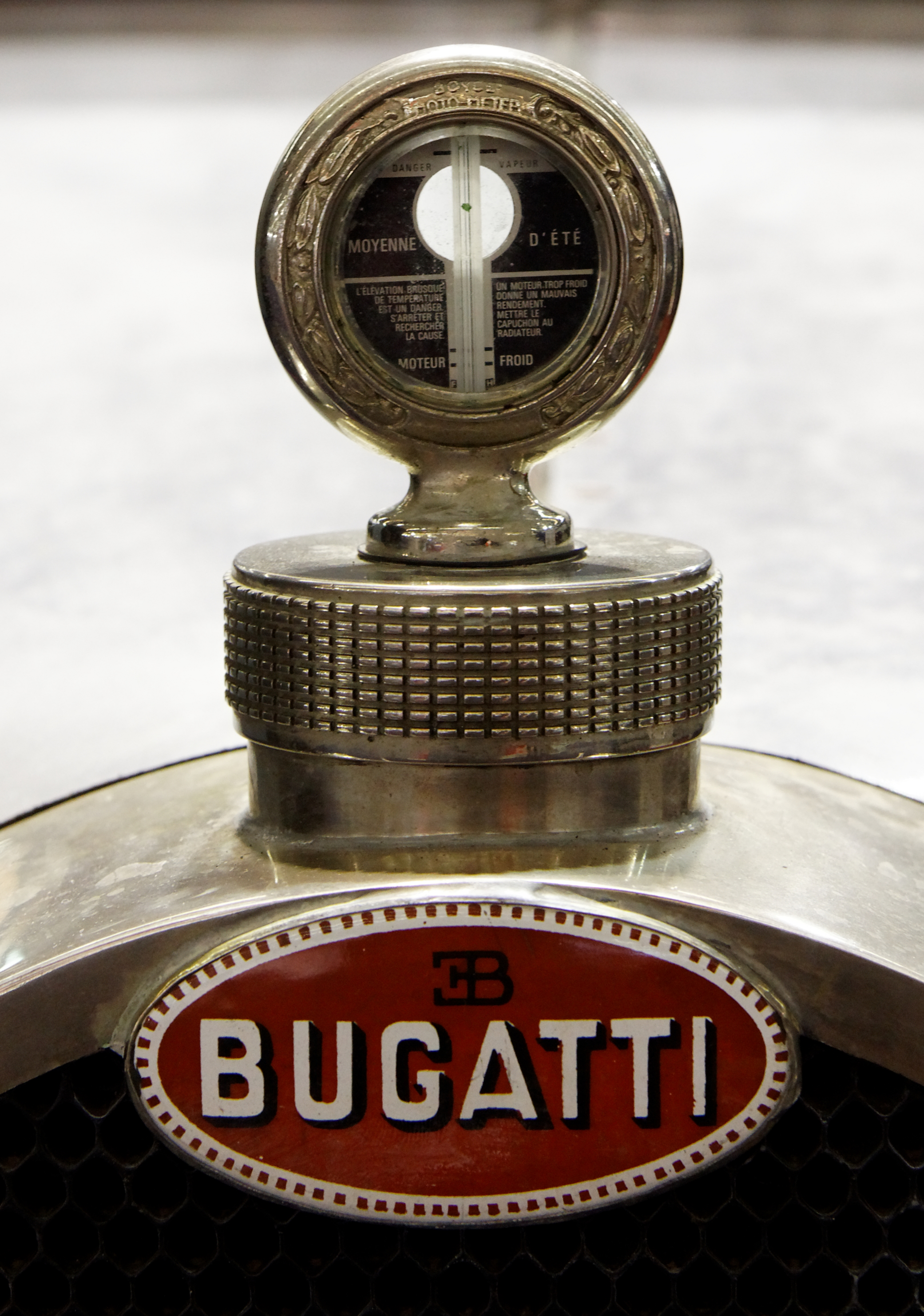 Bouchon de radiateur.